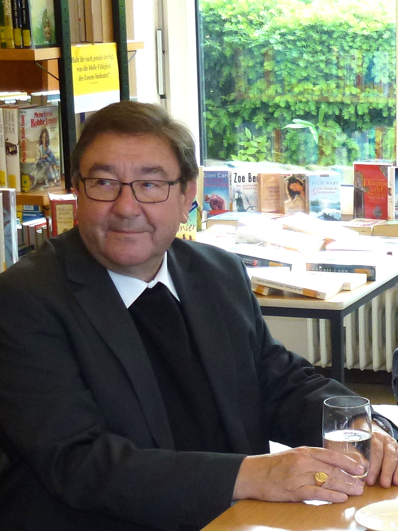 Besuch des Weihbischofs im Bistum Essen Wilhelm Zimmermann der Kath. öffentl. Bücherei St.Mauritius ( Mauritiusdom) Hattingen-Niederwenigern am 19.06.2015.